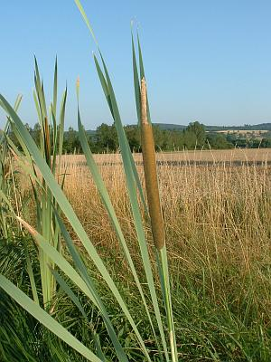 Typha latifolia